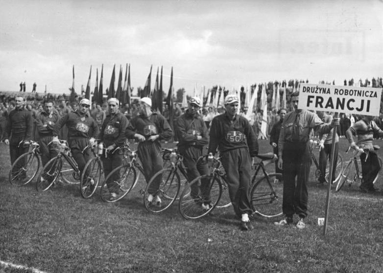 Radrennfahrer, französische Mannschaft Das grosse internationale Radrennen des Friedens Warschau-Prag Prag-Warschau Am 28. April 1950, dem 30. Jahrestag der Polnischen Radrenn-Union, starteten die Radrennmannschaften aus allen Teilen der Welt zur frohen Fahrt Warschau-Prag, Prag-Warschau, die zu einer internationalen Demonstration für den Frieden wurde. Eine deutsche Delegation nimmt an dieser Fahrt teil. UBz: Die französische Mannschaft Aufn.: Illus 6.5.50 Pa 2 6420-50-V Leihweise Illus Berlin ws